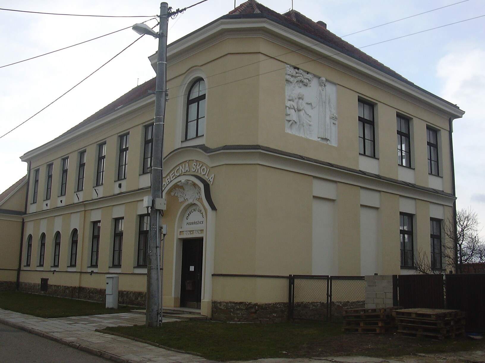 obecní úřad a škola Podbřežice (Vyškov- czech republic)